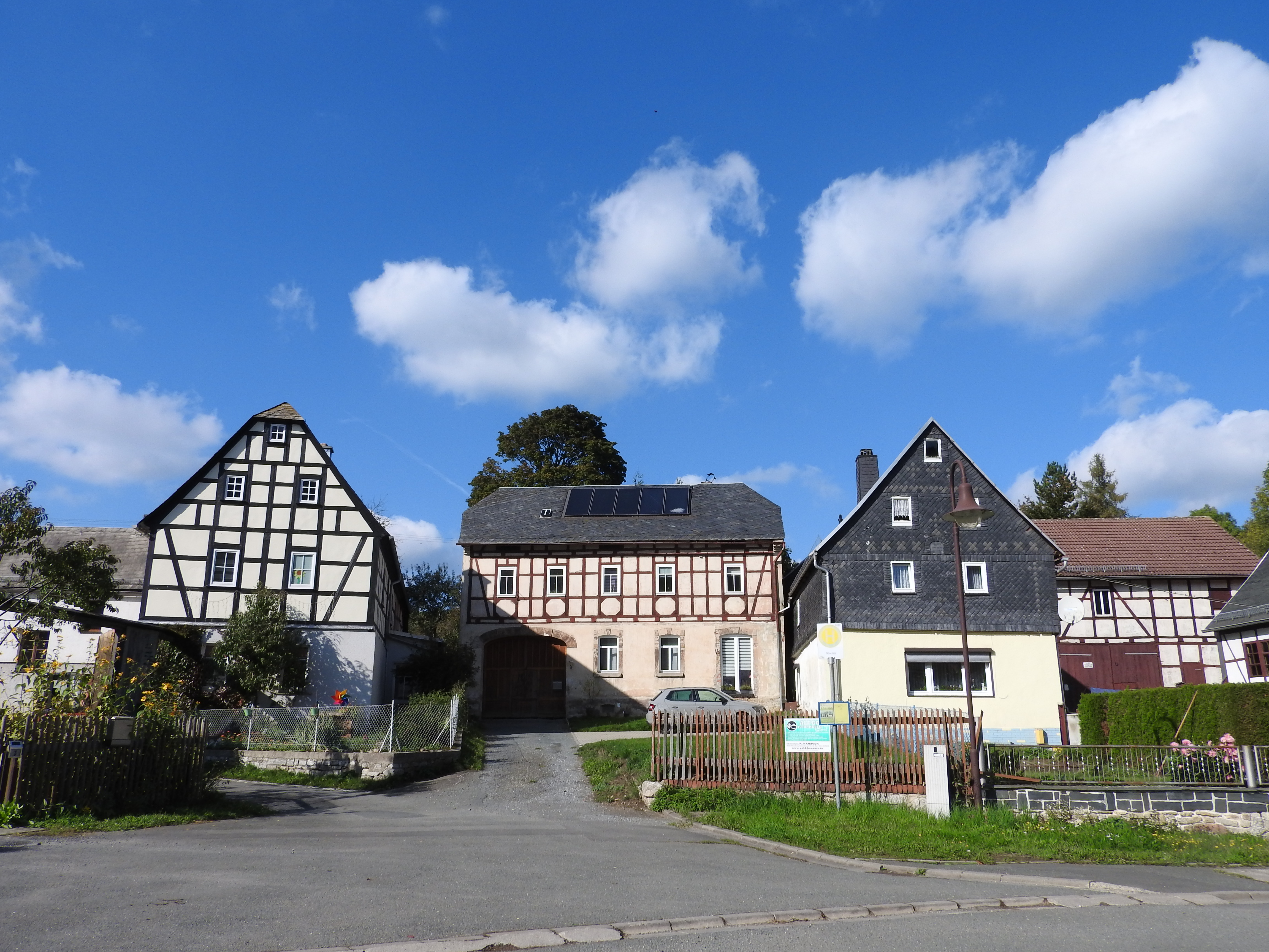 Göschitz, Thüringen